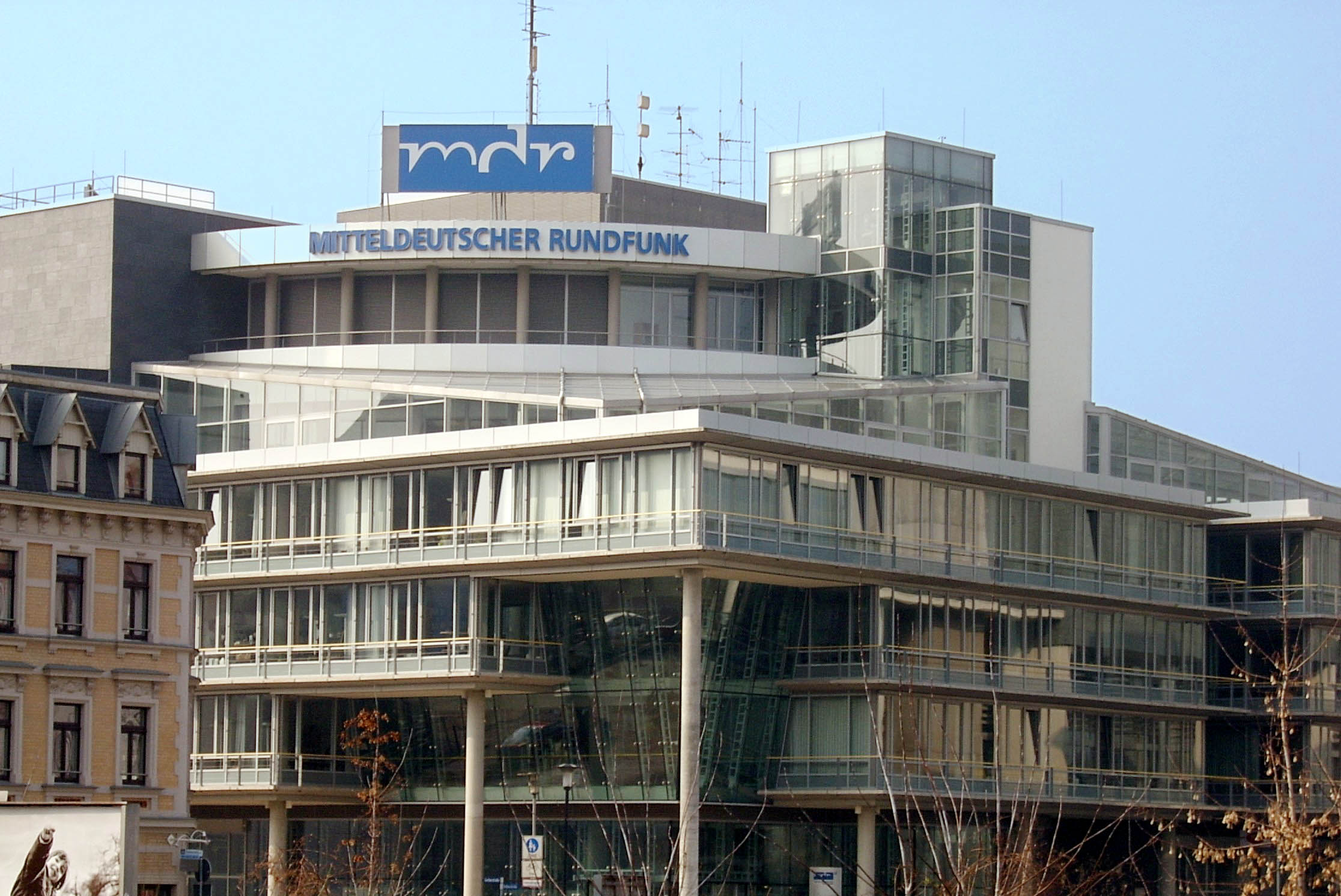 Hörfunkzentrale des MDR in Halle (Saale). Gebäudeentwurf (Architekt): Novotny Mähner Assoziierte - Google Maps - Google Earth